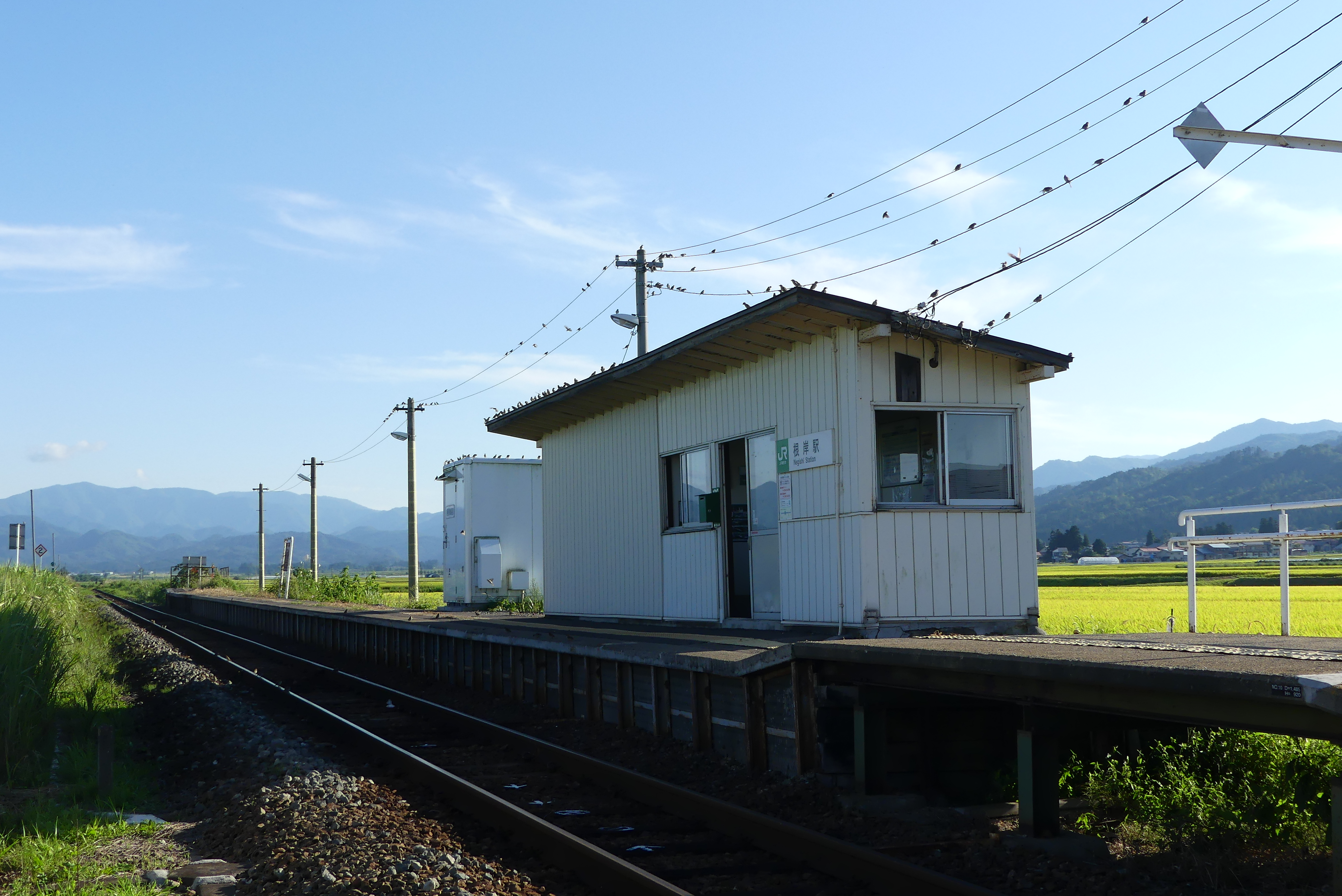 JR東日本・根岸駅外観Panasonic Lumix DMC-FZ300